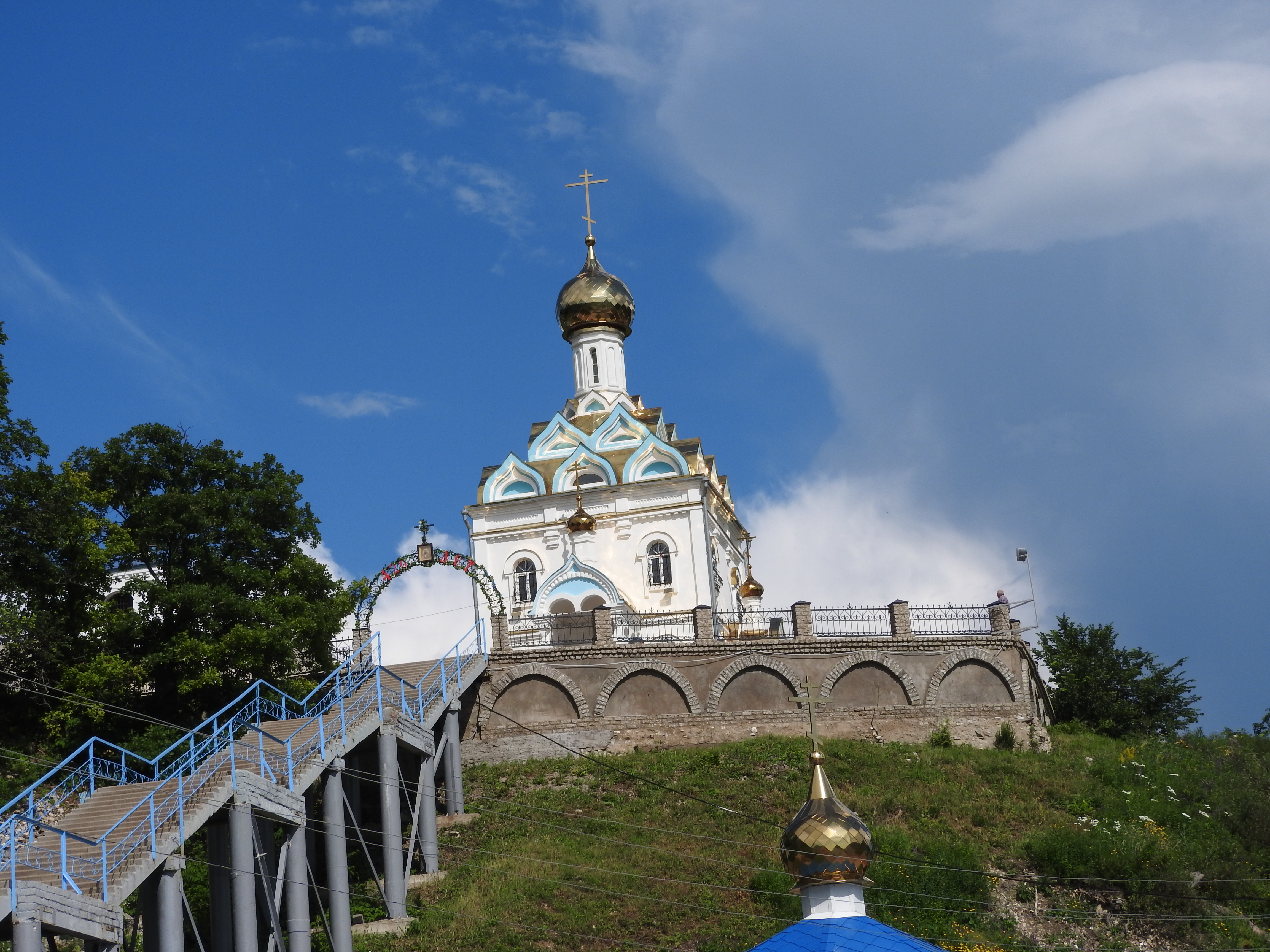 Церковь возле минеральных источников